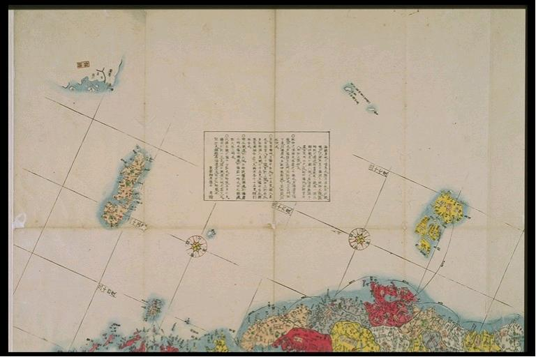 長久保玄珠『日本輿地路程全圖』（1791年、東北大学狩野文庫所蔵） 原図は長久保赤水